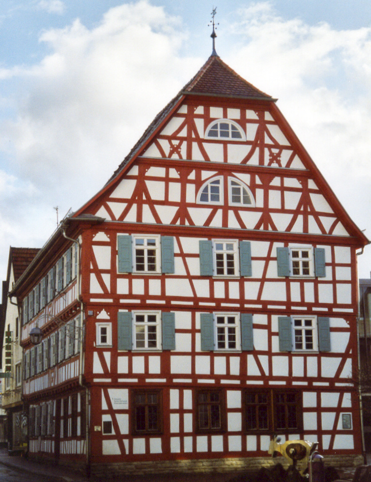 Das Adelsheimer Rathaus, Giebelseite. Schönes Beispiel fränkischen Fachwerkbaus, wenn auch nicht allzu schmuckvoll. Reizvoll, dass das Fachwerk bereits in der Erdgeschoss-Fassade einsetzt.